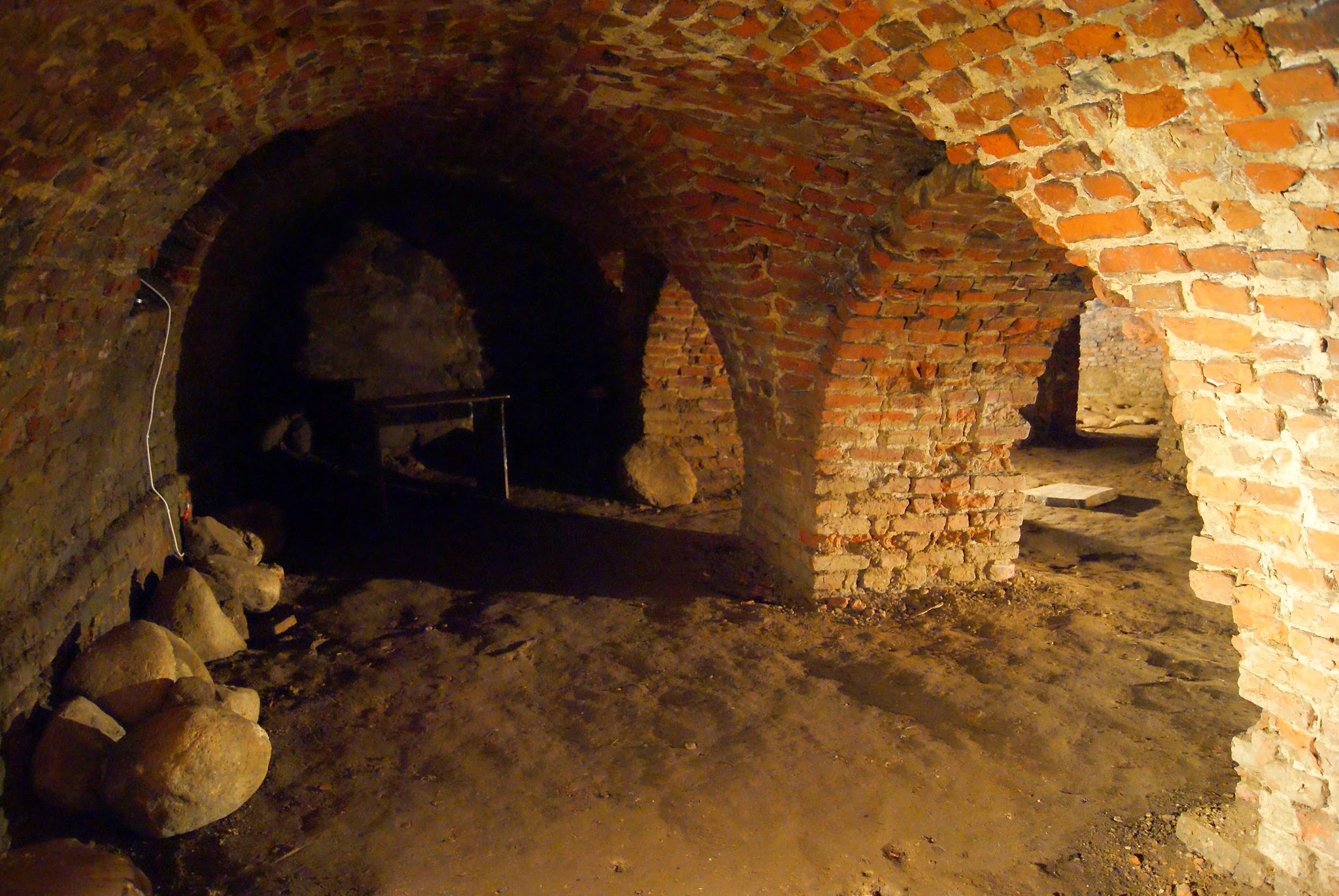 Alsunga, Alsungas novads, LV-3306, Latvia